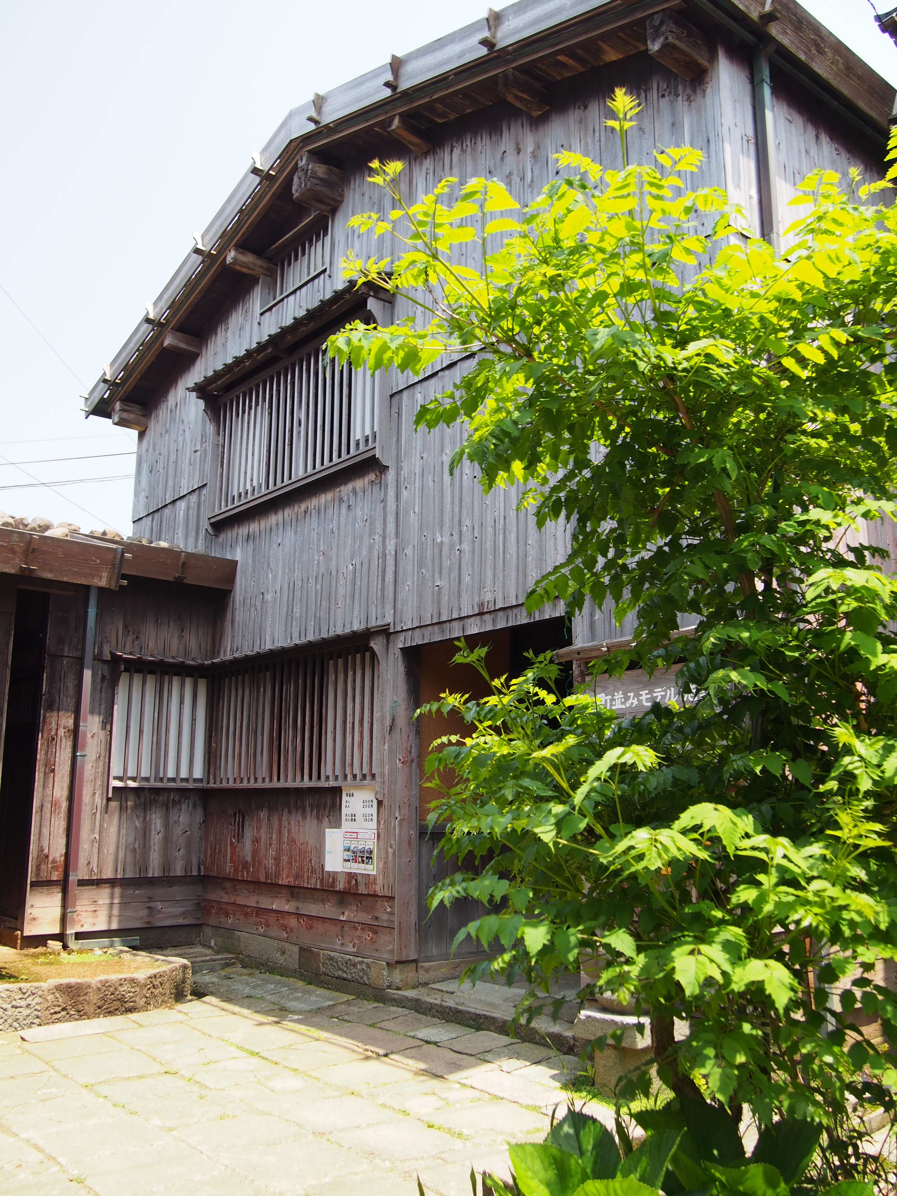 清九郎の家（佐渡市宿根木）